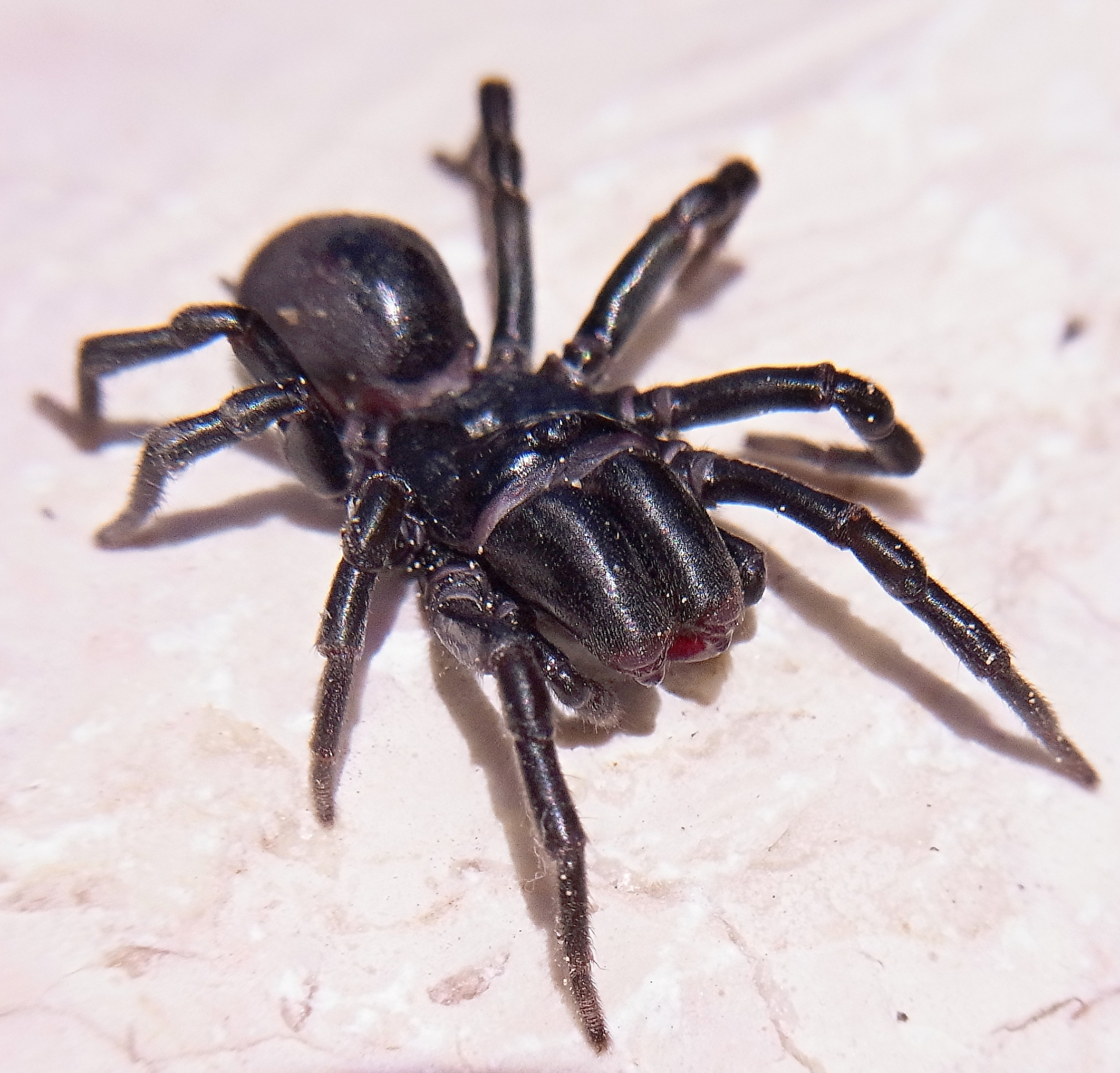 Atypus affinis, Männchen aus Süddeutschland, zwischen Tuttlingen und Rottweil, 700m, im Gartenteich ertrunken